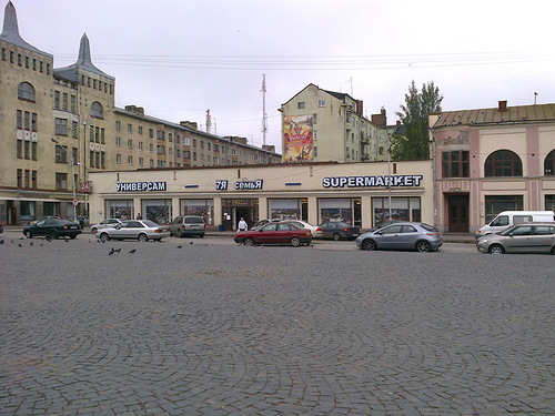 супермаркет Семья в Выборге